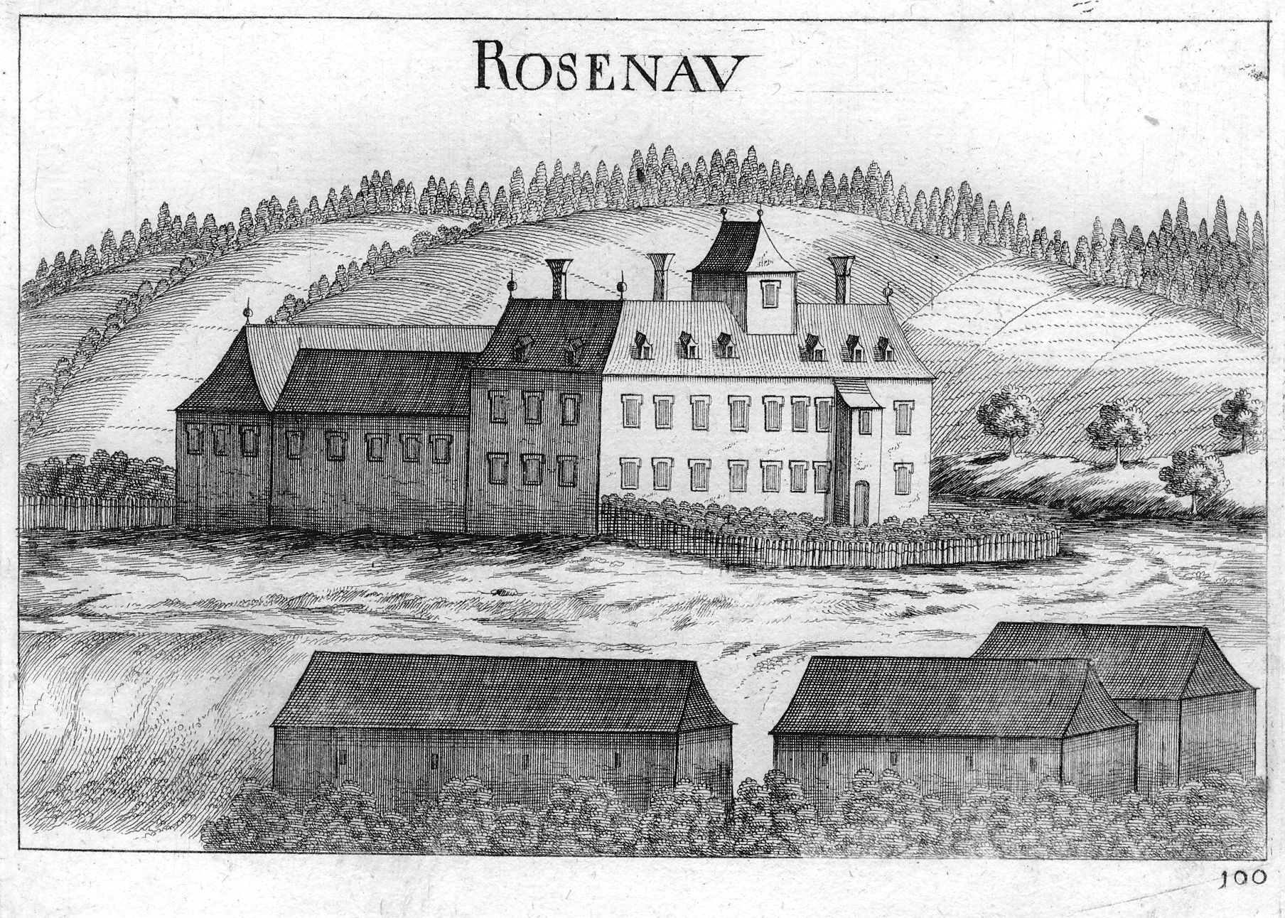 Kupferstich von Schloss Rosenau von Georg Matthäus Fischer (1672)